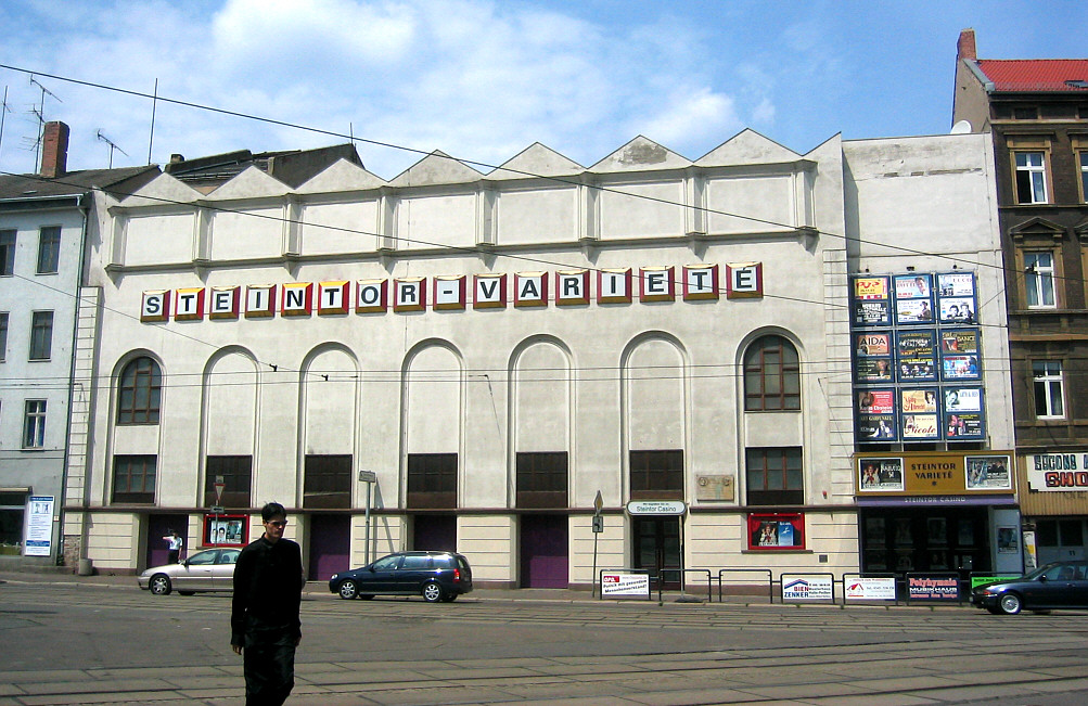 Halle (Saale), Germany: Steintor-Varieté